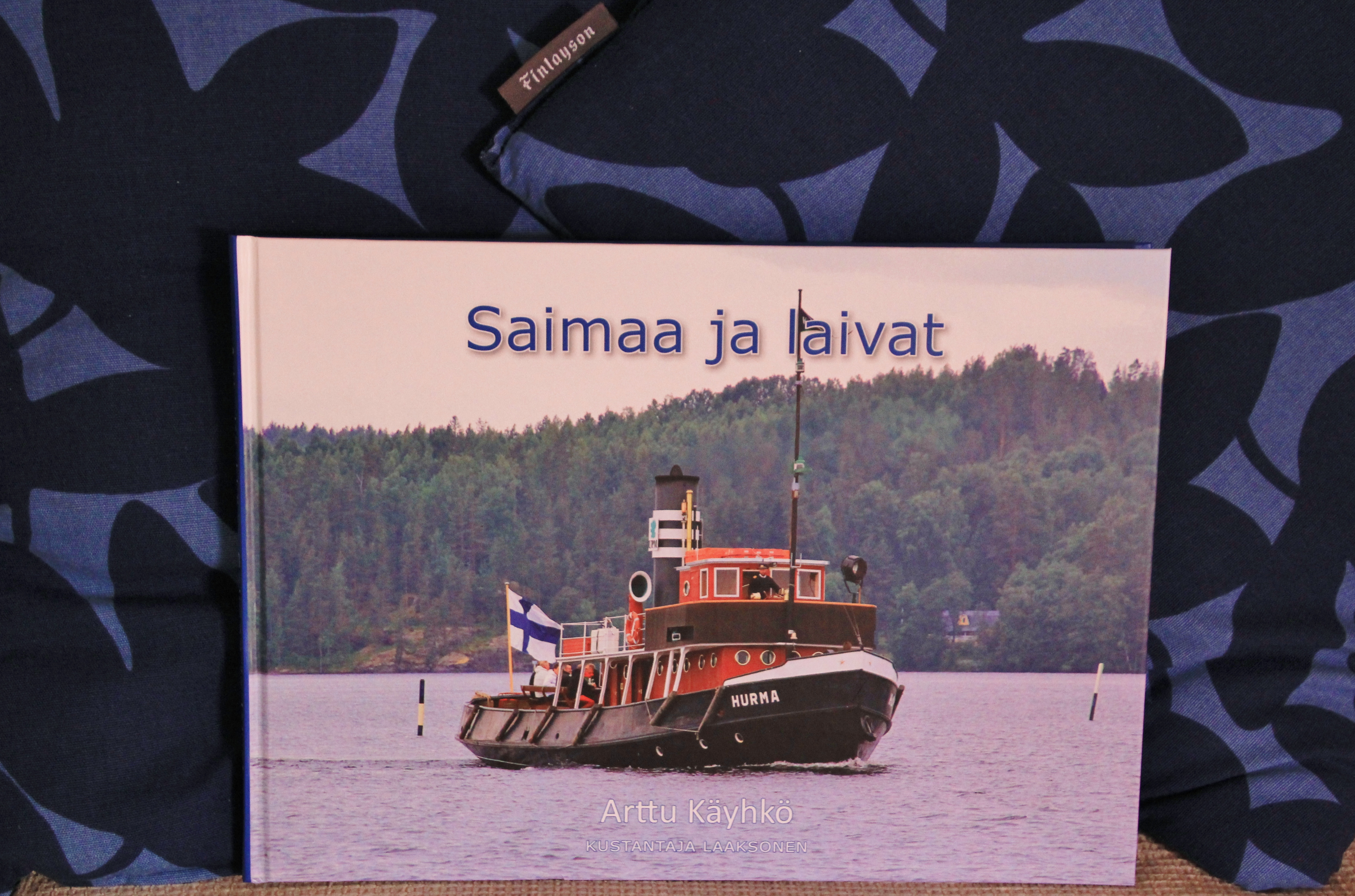 Saimaa ja laivat kirjan kansikuva. Höyrylaiva s/s Hurma saapuu kuvassa Savonlinnan matkustajasatamaaan.